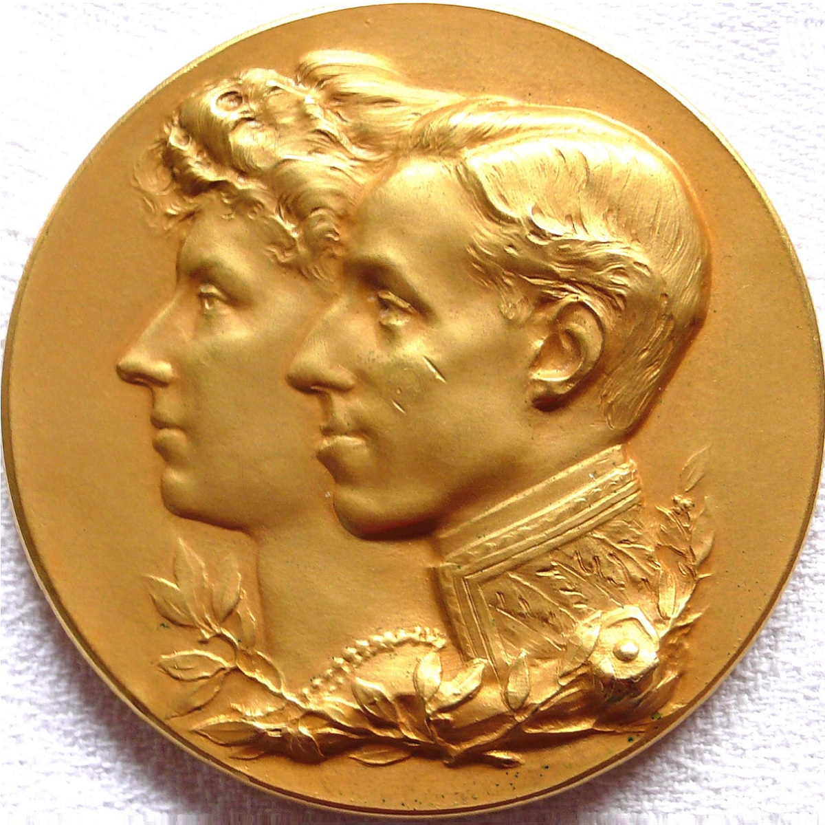 Anverso de la medalla de oro otorgada al relojero de Lascellas Francisco Coll en la Exposición Hispano Francesa de Zaragoza de 1908, certamen al que concurrió con este reloj, antes de su instalación definitiva en la torre de la catedral de Barbastro